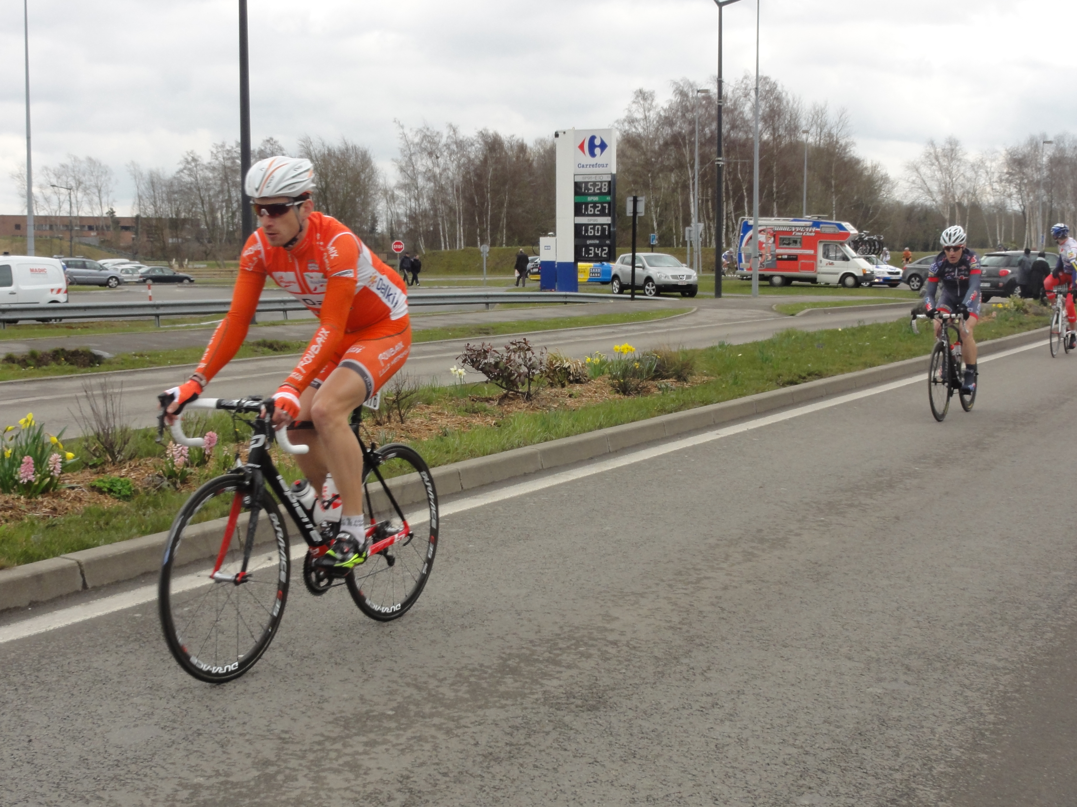 Reportage photographique réalisé le mardi 11 avril 2013 durant l'édition 2013 du Grand Prix de Denain à Denain, Nord, Nord-Pas-de-Calais, France. Depicted person: Kévin Lalouette